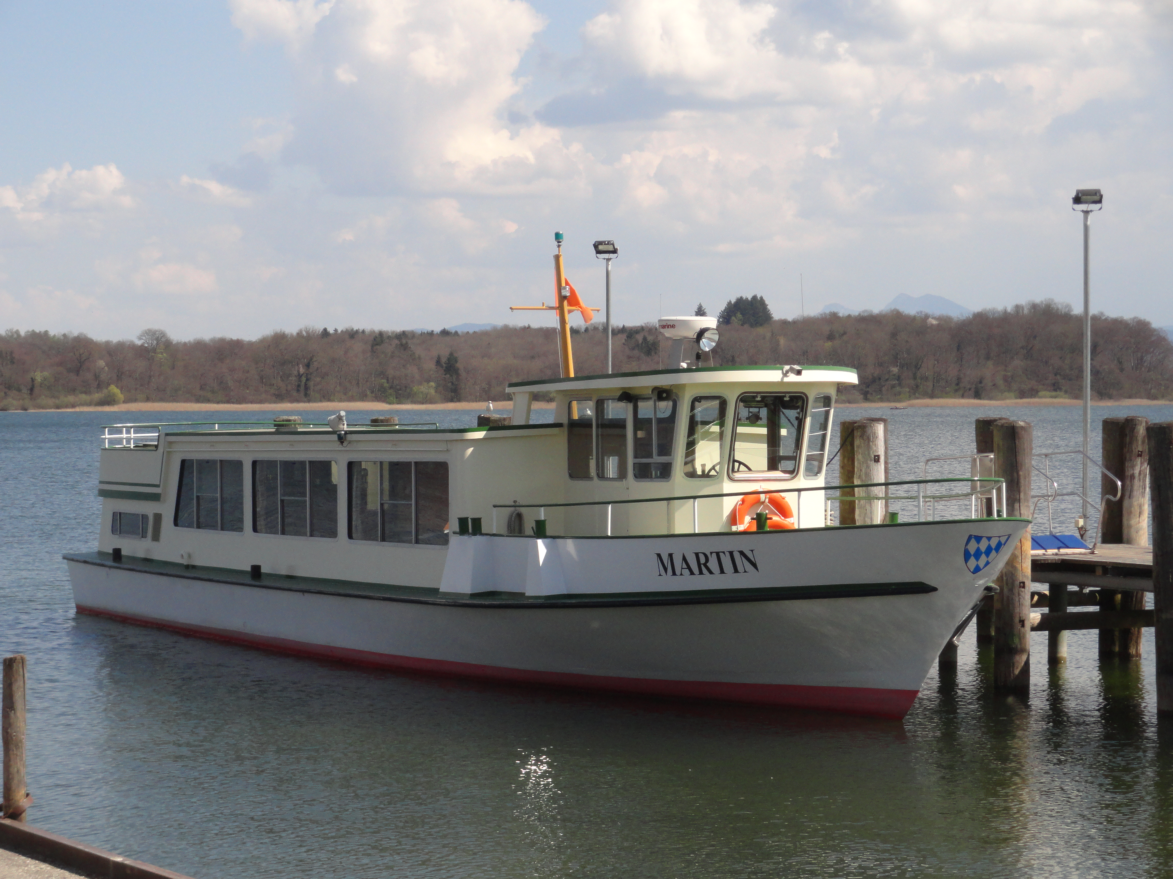 Das Fahrgastschiff Martin an einem Steg der Anlegestelle in Prien am Chiemsee